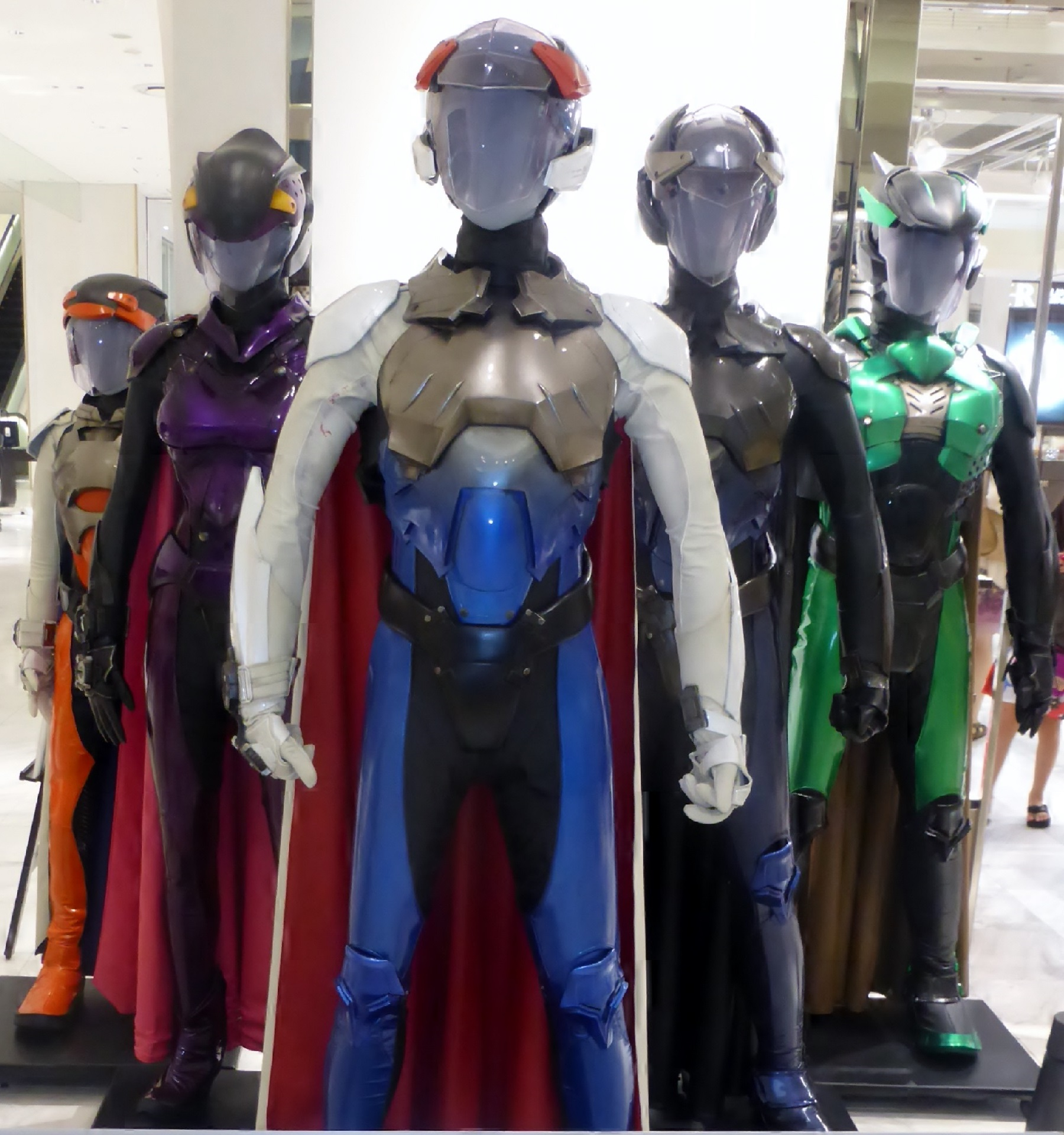 ガッチャマン実写版で用いられたGスーツを撮影。